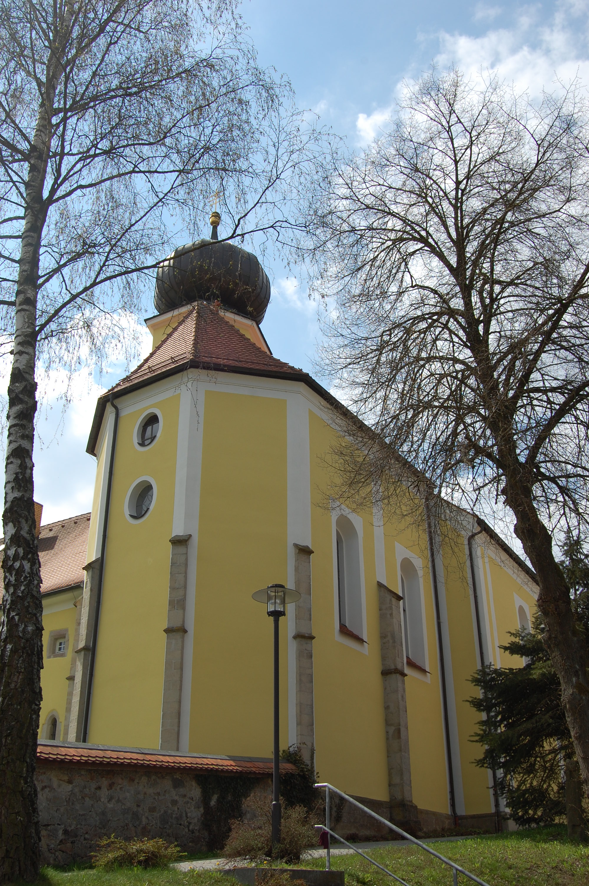 Böhmischbruck, Landkreis Neustadt an der Waldnaab, Oberpfalz, Bayern, Katholische Pfarrkirche Mariä Himmelfahrt, erbaut um 1250, 1562 mit dem Pfarrhof abgebrannt, 1577 Wiederaufbau, im 18. Jahrhundert Umbau (2011)